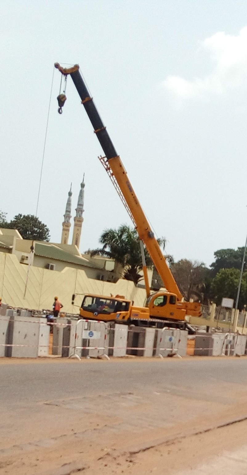 Machine transporteur This is an image with the theme "Africa on the Move or Transport" from: Guinea